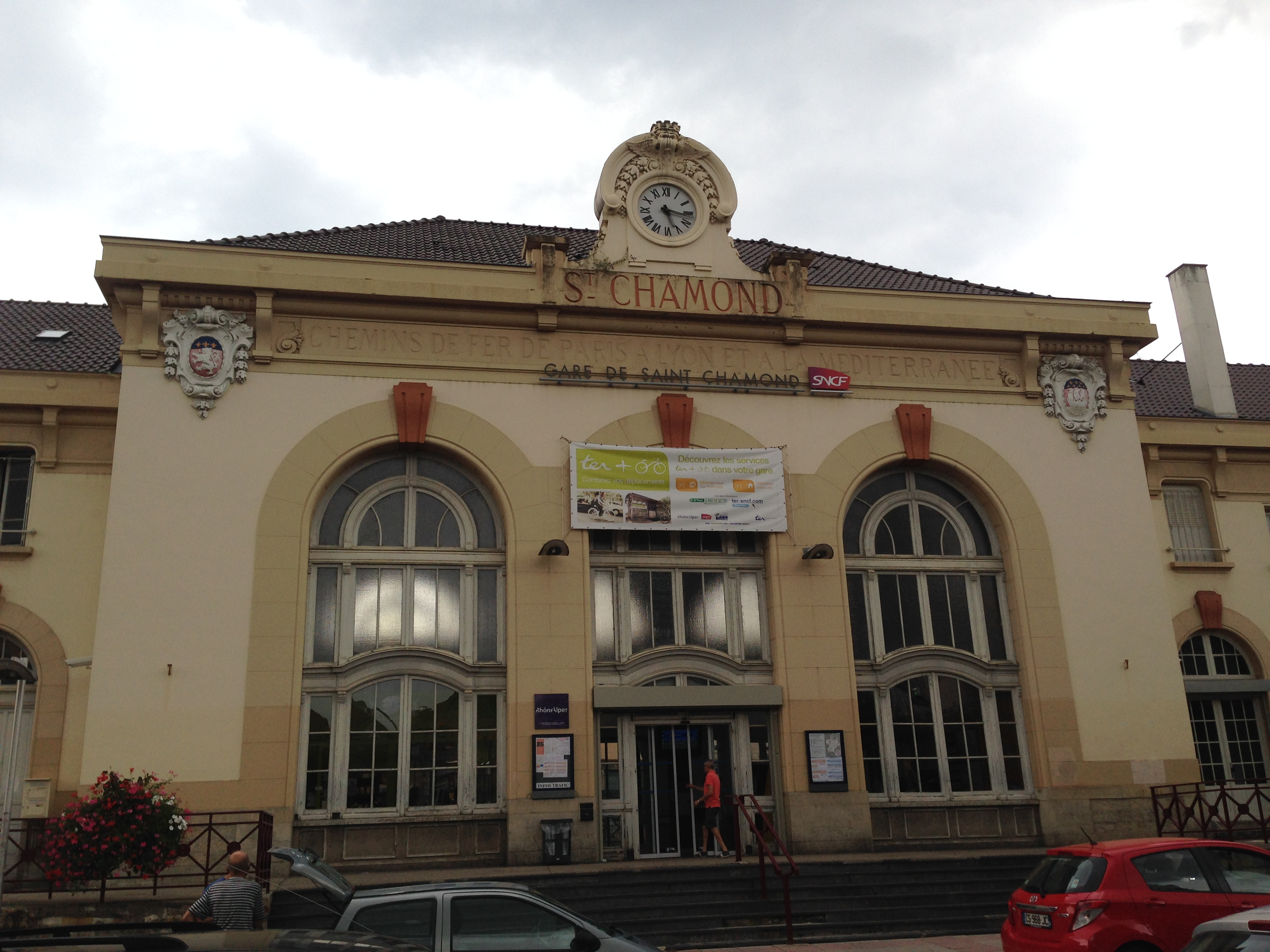 Gare de Saint-Chamond en 2015